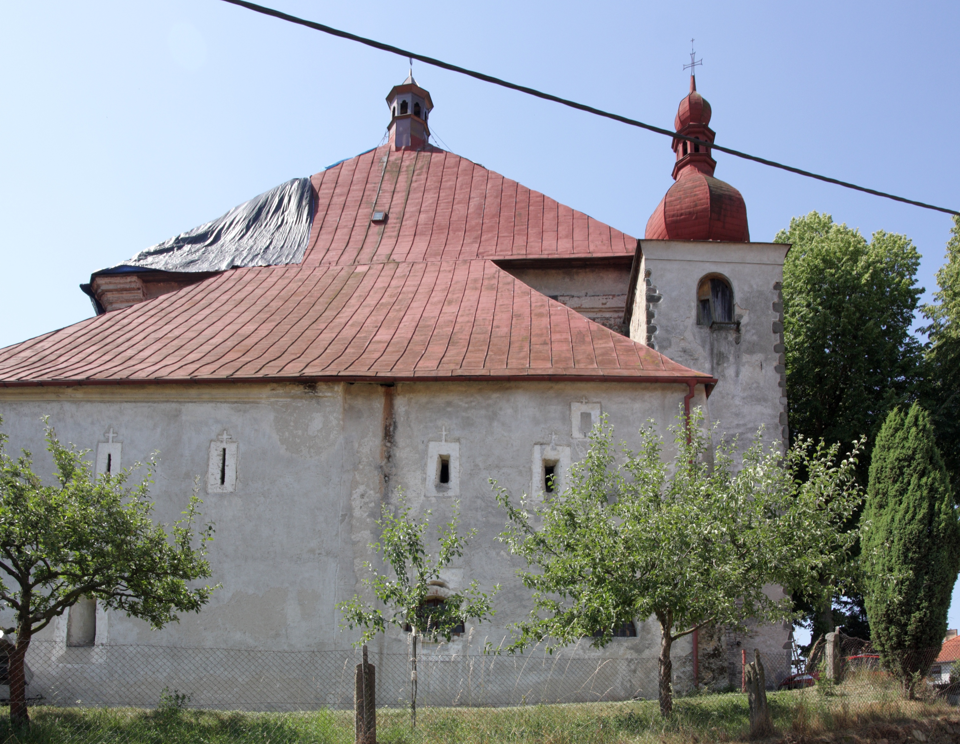 Přibyslavice (okres Třebíč) - kostel Svaté Anny, severní průčelí.